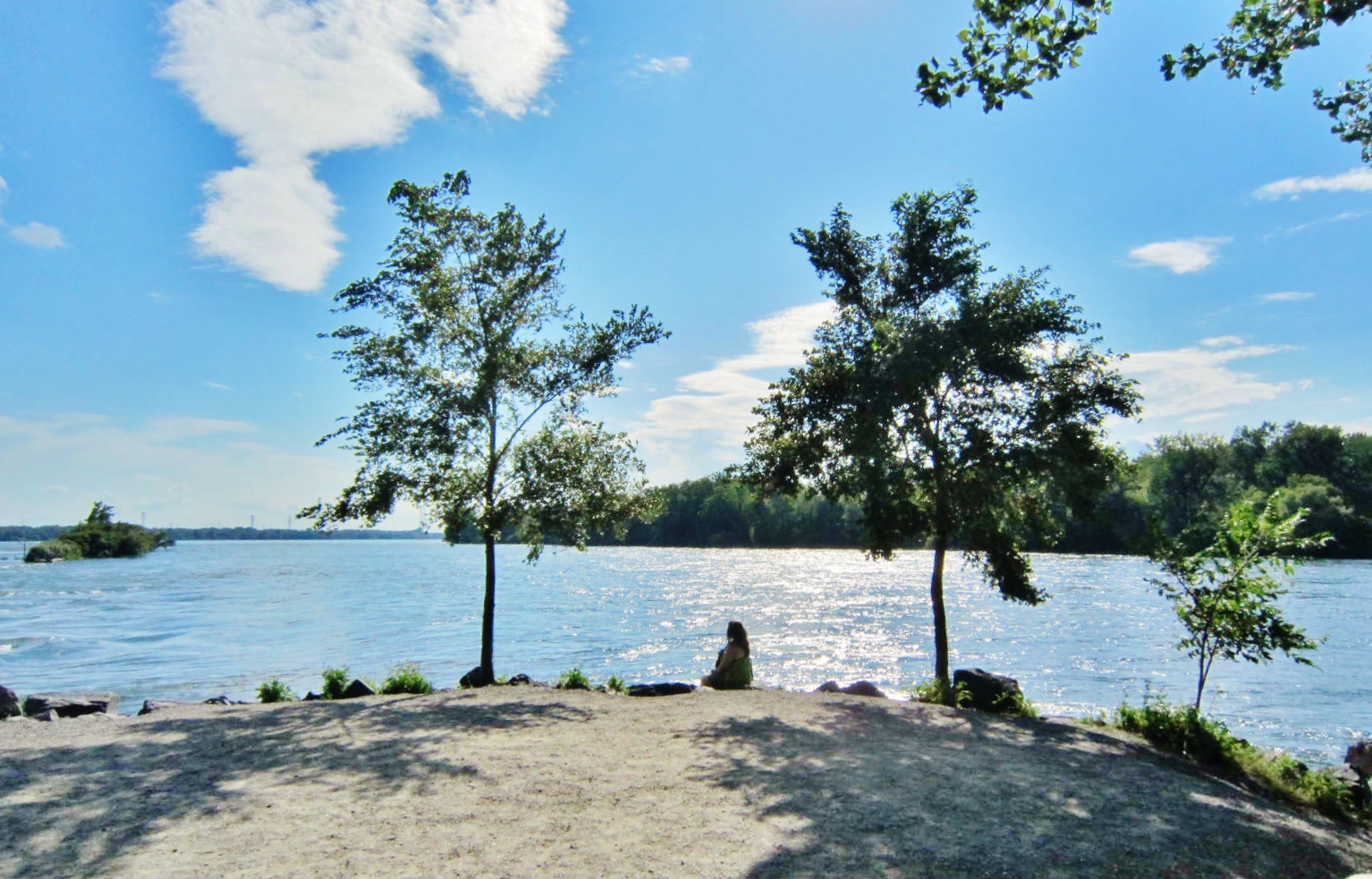 Le Saint-Laurent se jette dans les Rapides de Lachine / The Rapids start here...